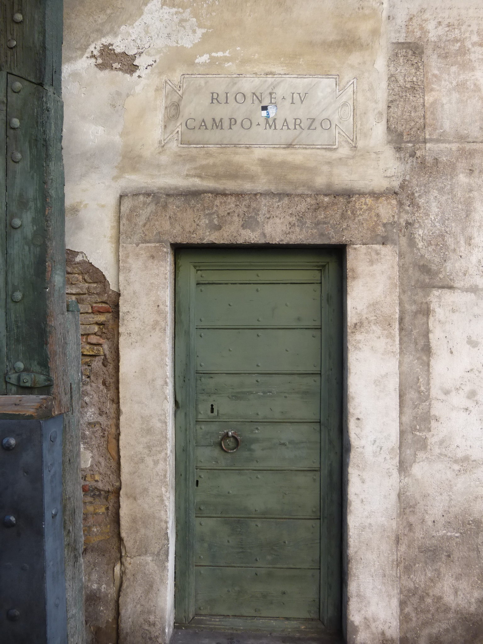 Roma, Porta del Popolo lato interno. Sulla porticina degli ambienti di servizio la targa (ante 1870) indica "RIONE IV . CAMPO MARZO", dicitura antica e comunemente usata fino all'inizio dell'Ottocento.